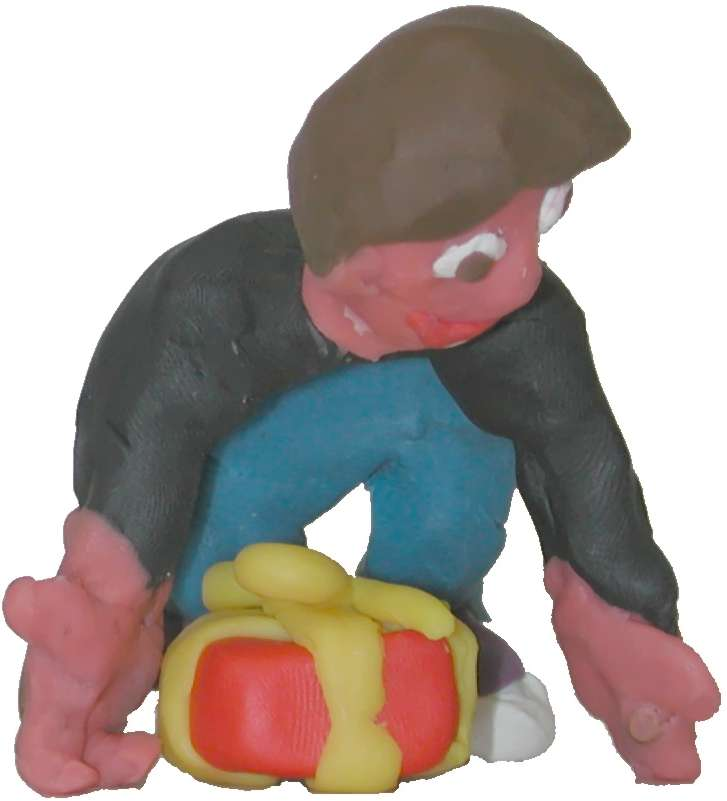 Bild eines Plastilinmännchens, das ein ebenfalls aus Plastilin geformtes Geschenkpaket aufhebt Erstellt von: nd Erstellt am: 20. April 2002, überarbeitet am 24. Juni 2004 Erstellt mit: Plastilin, Nikon Coolpix, Corel PhotoPaint Lizenzstatus Creative Commons Share Alike GNU-FDL